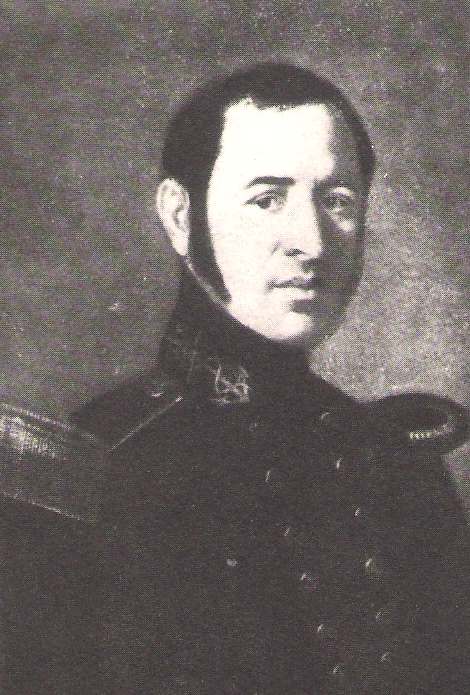 Vincenzo di Bartolo, capitano di Marina mercantile, che per primo, con l'Elisa, si recò nelle Indie Orientali